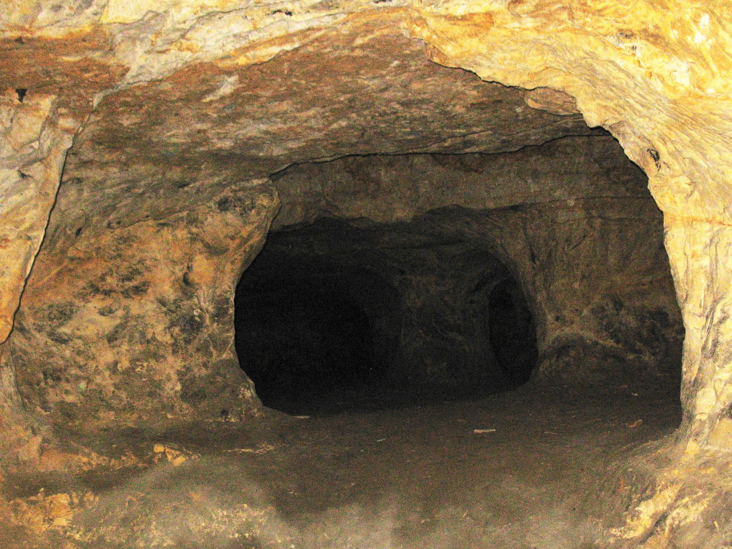 Chodba v Riedelově jeskyni